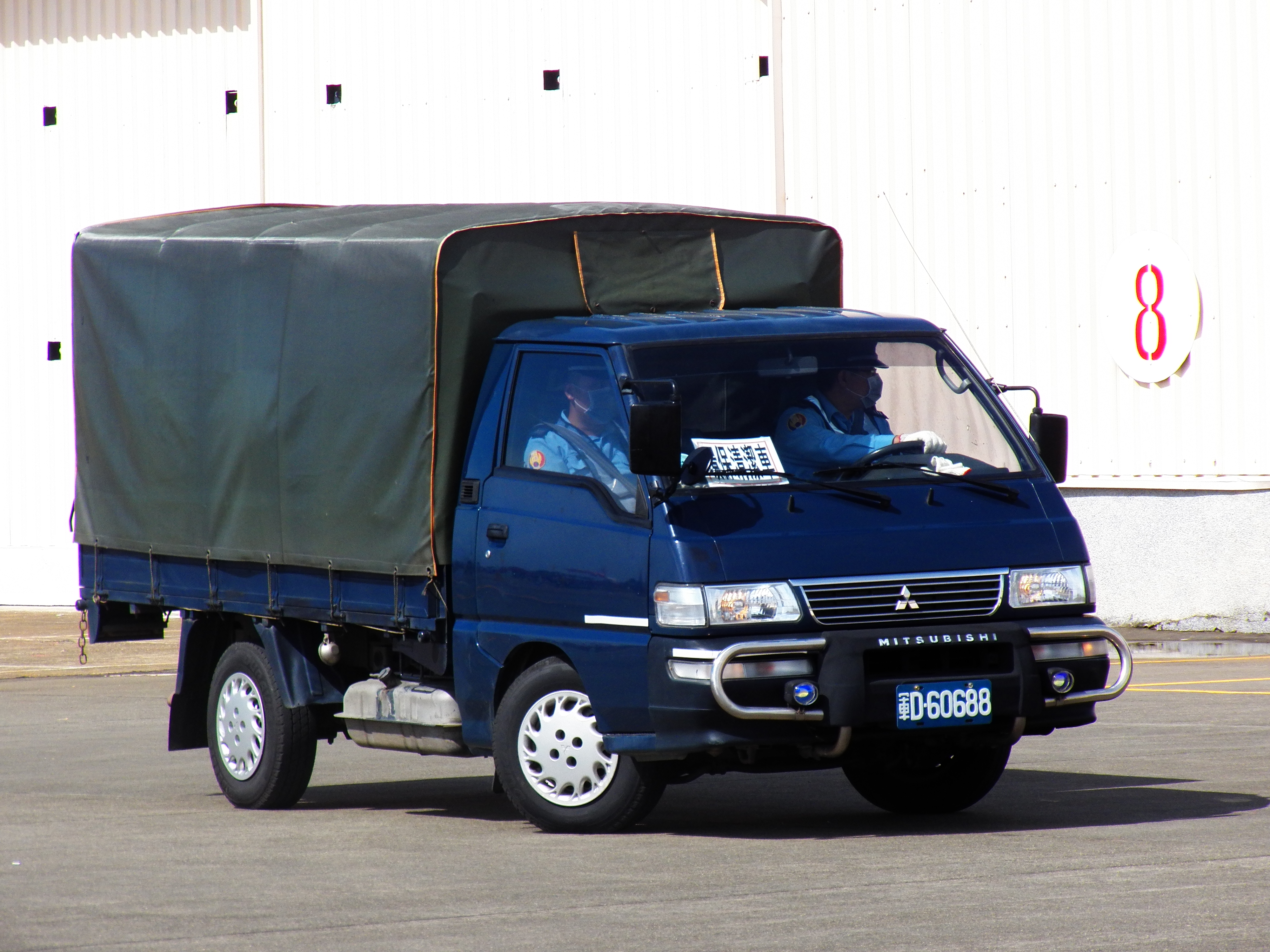 2012年空軍嘉義基地營區開放活動中，清運垃圾的空軍三菱得利卡貨車。